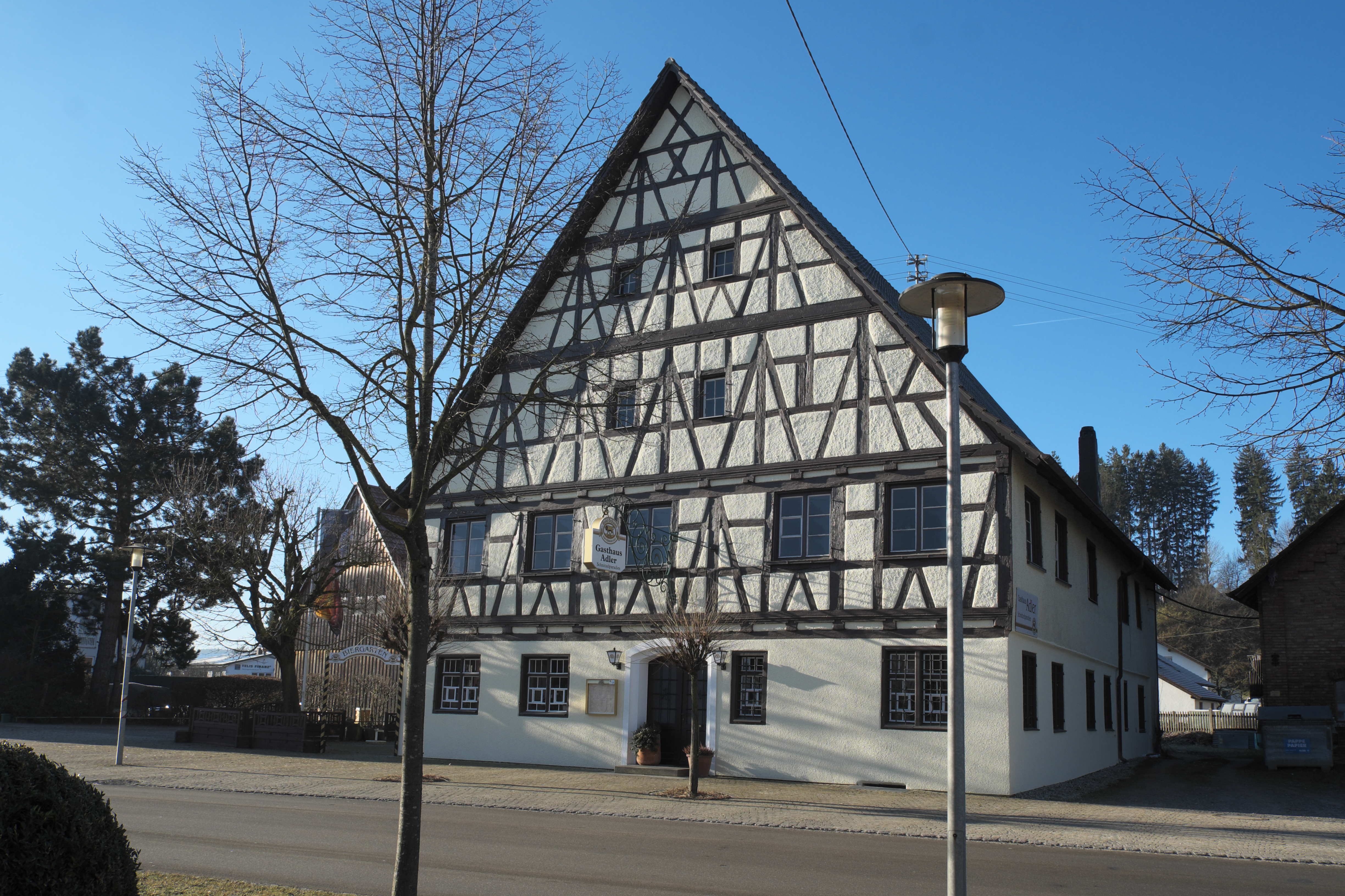 Gasthof Adler in Berkheim) im Landkreis Biberach (Baden-Württemberg/Deutschland)